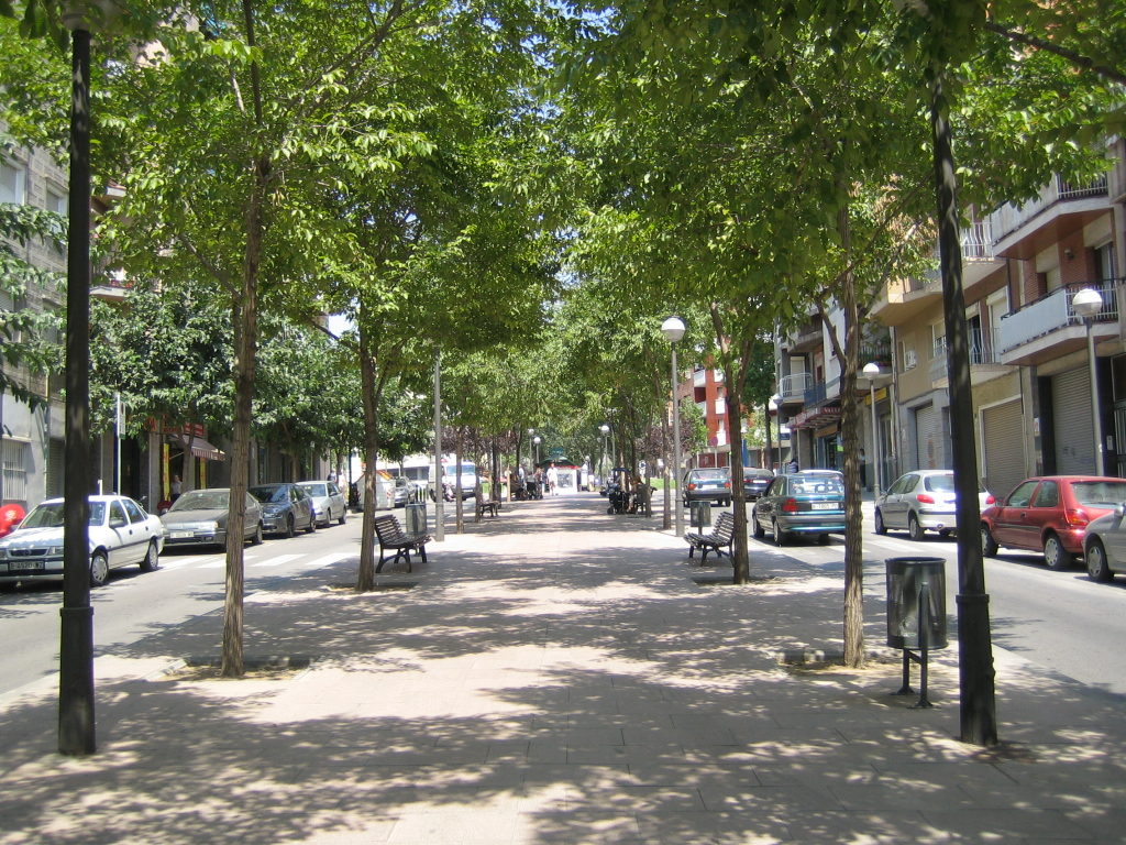 Foto hecha por mi desde la avenida tomás jimenez hacia el norte, el jueves 21 de Julio del 2005 a las 11:39 de la mañana. Con la cámara CANON ixus 40